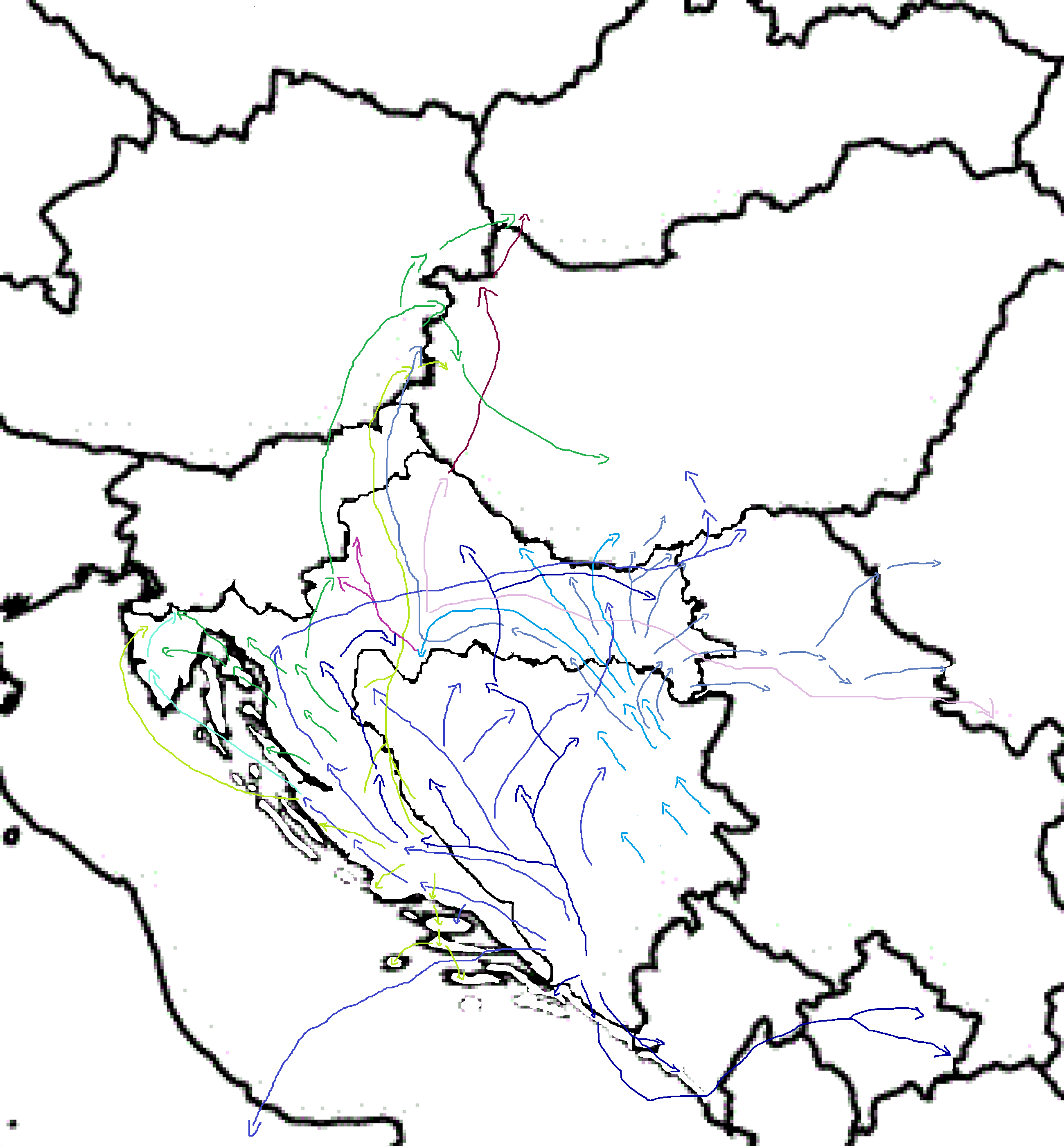 Turske i post turske migracije (15-17. st.) ; Južni štakavski ikavci iz okolice Ljubuškog u Molise i do Zadra, a nakon čakavicije u okolicu Pule (JZ Istarski) Sjeverni štakavski ikavci (Bunjevci) iz okolice Mostara u sjevernu Dalmaciju, pa Liku pa Bačku (novo)Šćakavski ikavci, širenje novoštokavizacije po zapadno bosanskim enklavama i po Pounju (Bihać) i Posanju (Prijedor), sve do Posavine (Derventa) i iz porječja rijeke Bosne u Slavoniju Šćakavski zatvoreni ekavci(pa ikavci) (Šokci) iz sjeverne Bosne u Slavoniju, Podravinu i Podunavlje i Baranju te prema Banatu Šćakavski jekavci (Bošnjaci) iz istočne Bosne prema srednjoj Bosni, Baranji (Pečuh), Podravini (Virovitica) i Pounju (Kostajnica) Novoštokavski jekavci iz Poneretlja u zapadnu Bosnu, središnju Slavoniju (Osijek i Našice), SZ HR (Bjelovar), istočnu Liku, Banovinu (Glina) i sjevernu Dalmaciju, u primorje te preko Dubrovnika na Kosovo i u Boku Srednječakavski ekavo-ikavci iz istočne Like na otoke i u središnju Istru, Žumberak i u Gradišće i djelove Mađarske Južnočakavski ikavci iz Pounja u Gradišće(a i šćakavskih ikavaca/šokaca), a i u Posutlje gdje se kajkaviziraju(donjesutlanski) te iz Dalmatinske Zagore u zapadnu Istru seoba kajkavaca (turopoljsko-posavski) na sjever pa nakon "naturalizacije" (dakle skupa s zagorsko-međimurskim) u Gradišće te seobe kajkavaca (turopoljsko-posavski) na istok (banat) gdje se torlakiziraju/asimiliraju